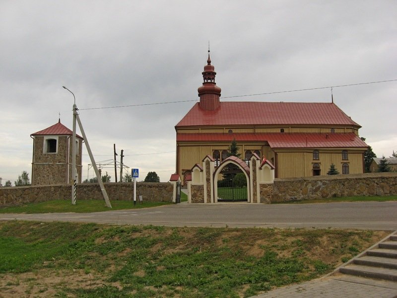 Адэльск. Касцёл Унебаўзяцця Найсвяцейшай Дзевы Марыі